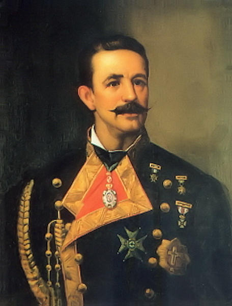 Retrato del marino e historiador español Cesáreo Fernandez Duro (1830-1908).